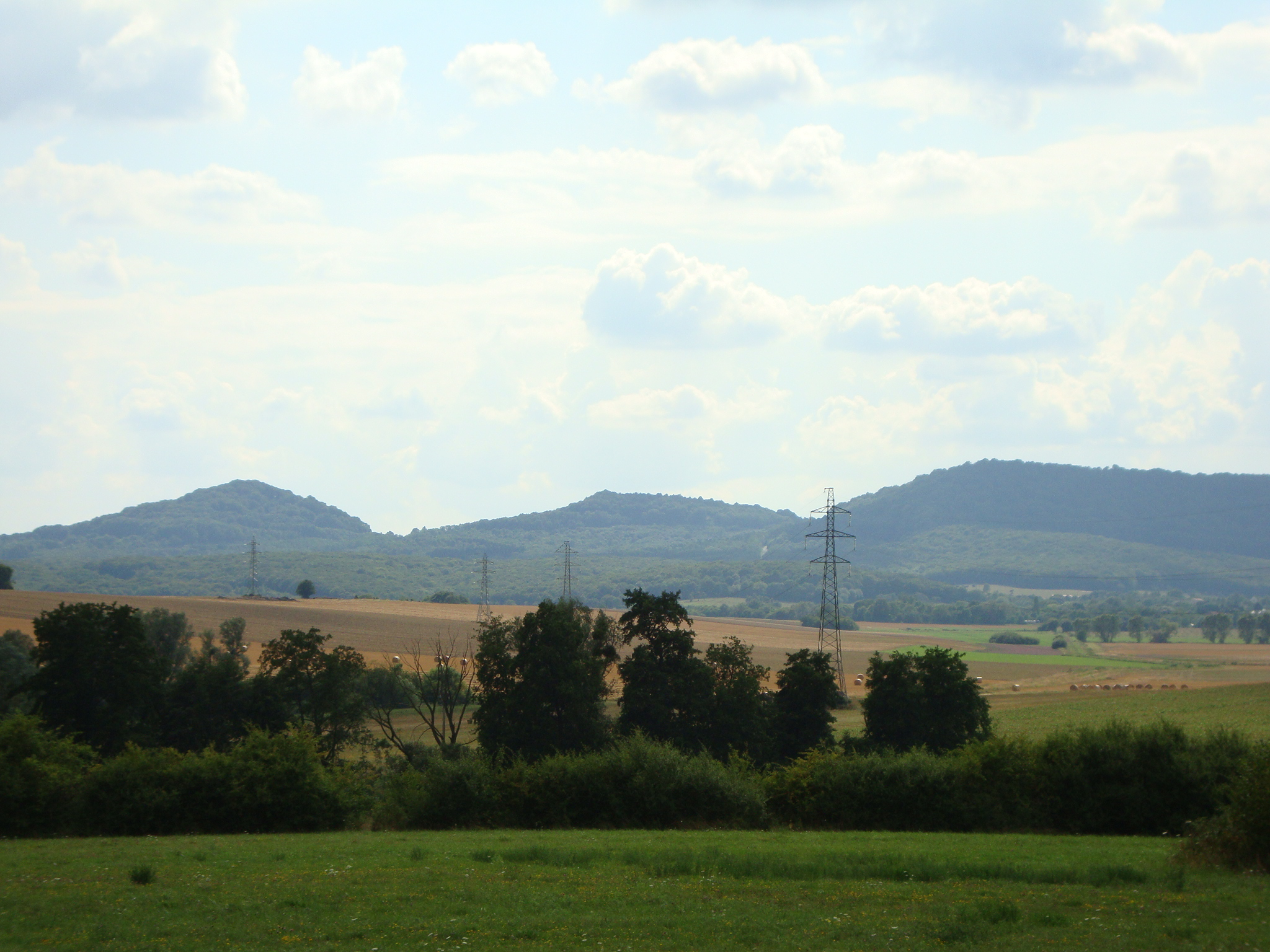 Paysage hettangeois